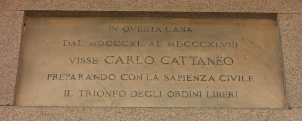 Erinnerungstafel für den italienischen Patrioten Carlo Cattaneo (1801-1869) an seinem Wohnhaus 1840-1848 in Mailand